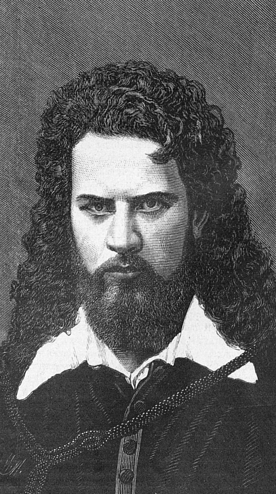 Людвиг Барнай в роли Уриеля Акосты